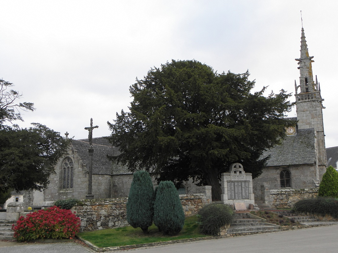 Église Saint-Agapit à Plouégat-Guérantd(29).